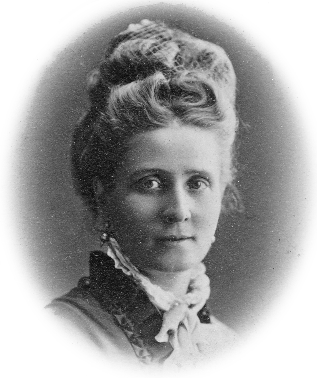 Linda Boström, skådespelare vid Hjalmar Agardhs sällskap 1865